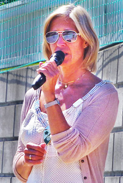 Ordfører Eli Hovd Prestegården, Nore og Uvdal kommune. Bilde fra åpningen av barneturnstevnet 2014 i Nore.